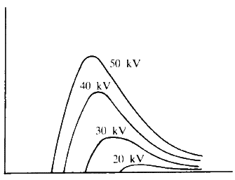 Rrezatimi i bardhë nga gjeneratori i rrezeve X